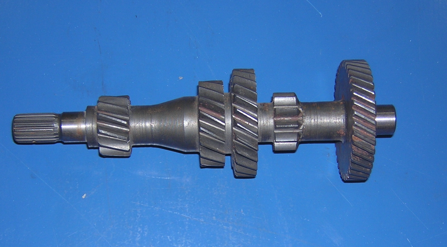 Engranaje de caja de velocidades.